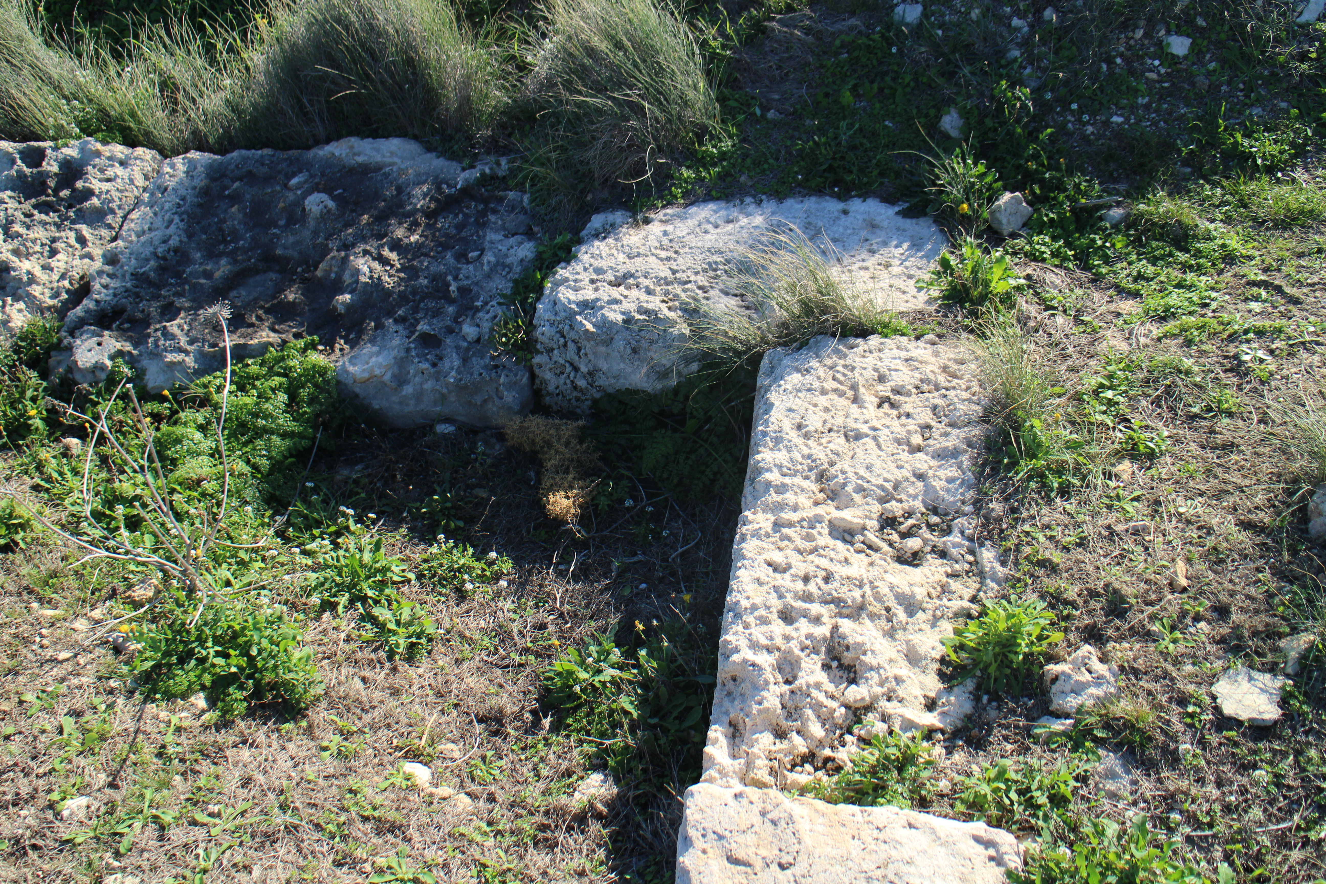 Ras ir-Raheb